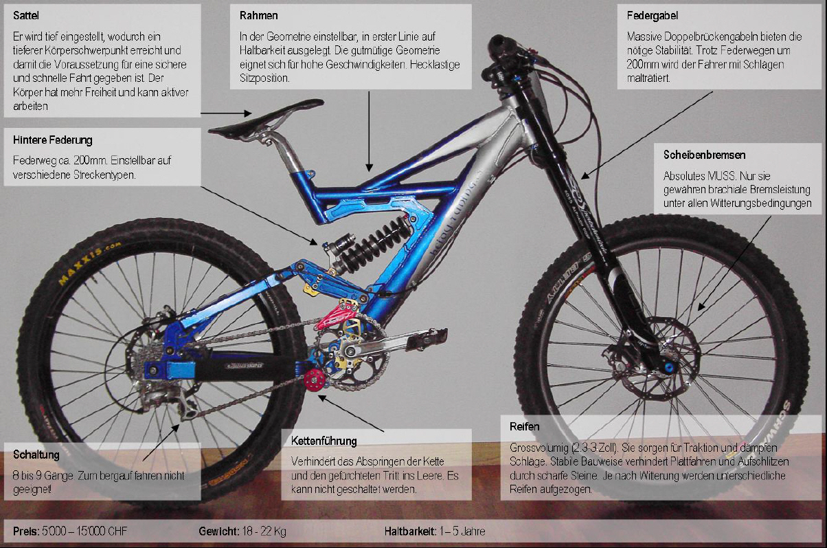 Downhill Racebike